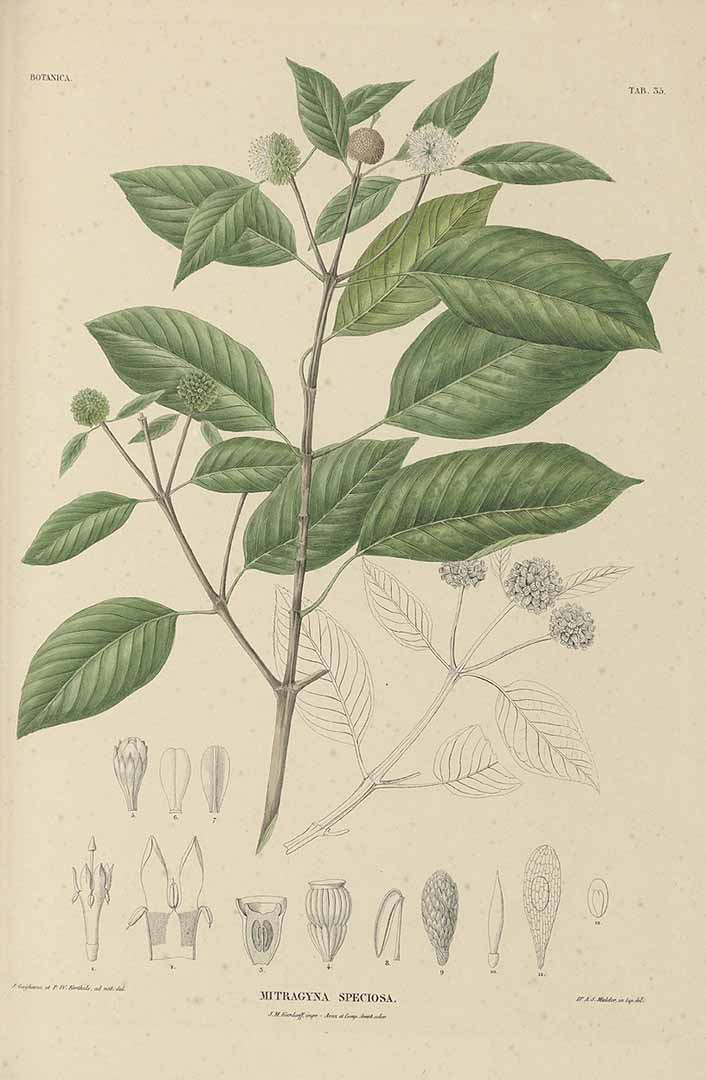 Ілюстрація Mitragyna speciosa